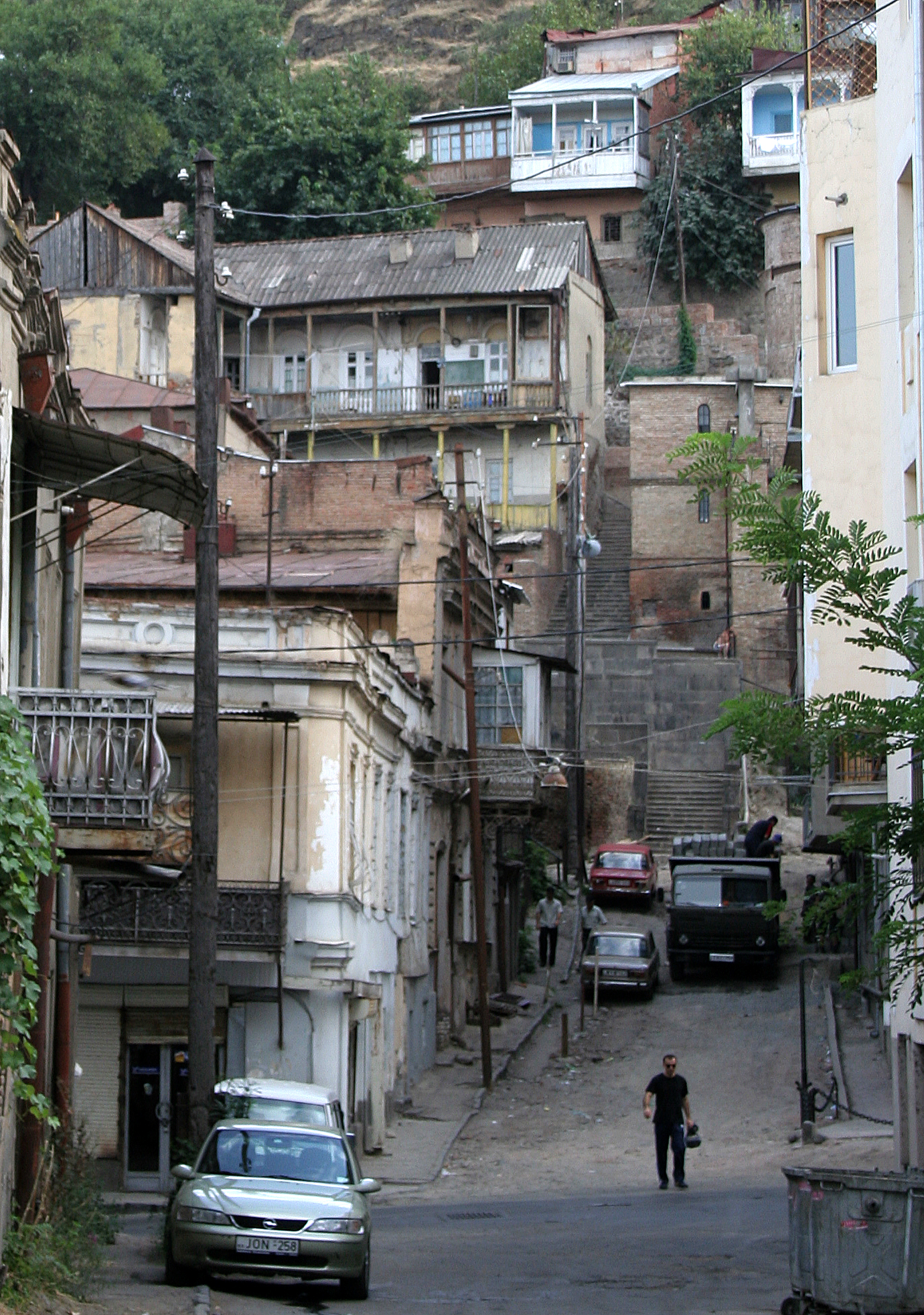 Beth Lekhem Quarter